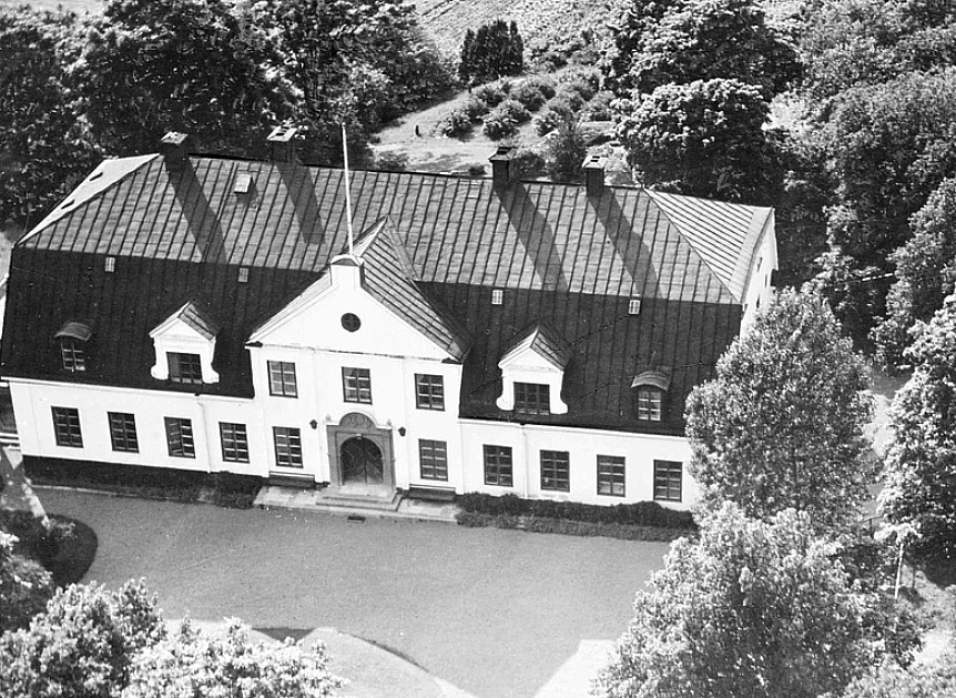 Flygfoto över huvudbyggnaden på Hammarskogs herrgård, Dalby socken, Uppland